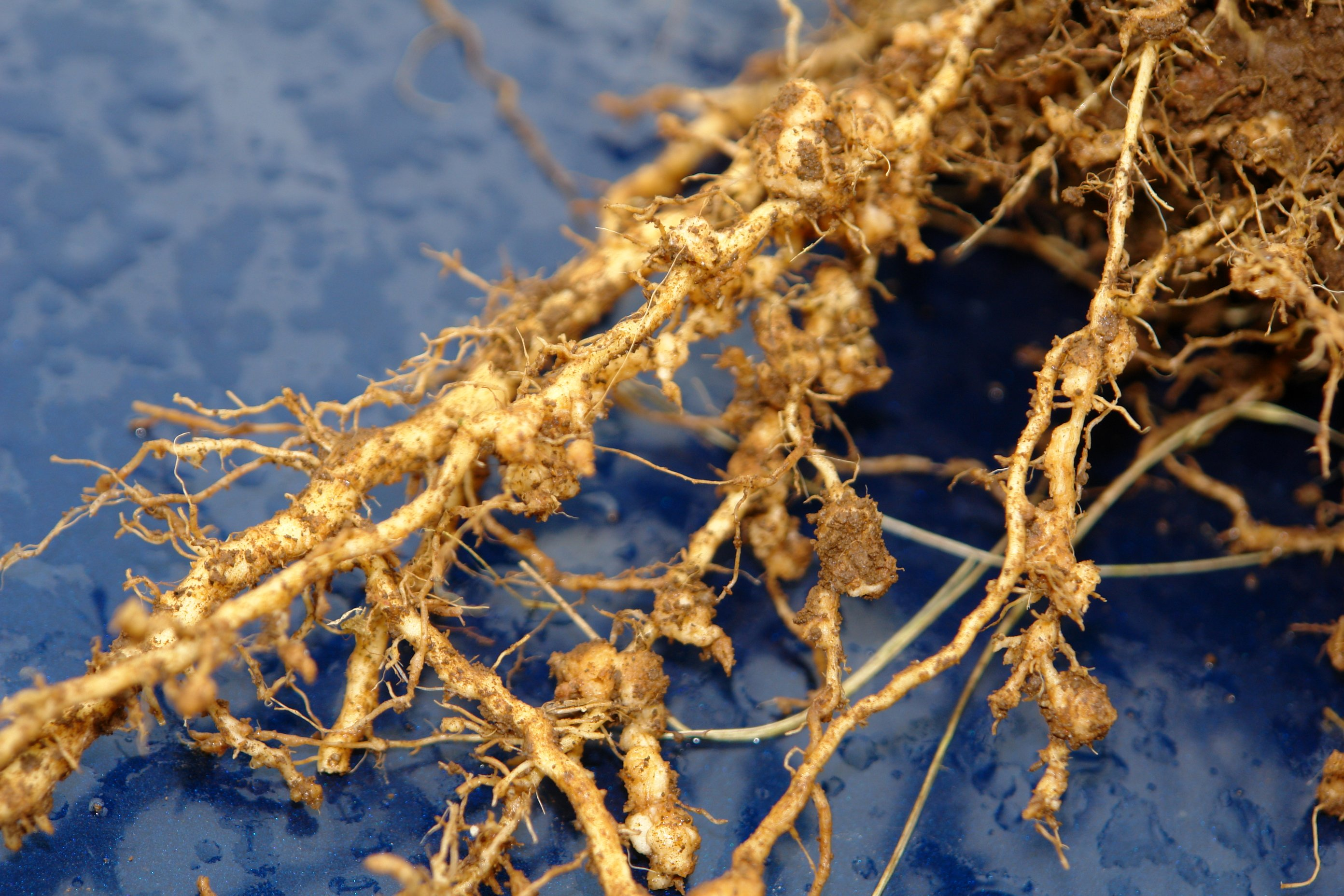 Meloidogyne sp.